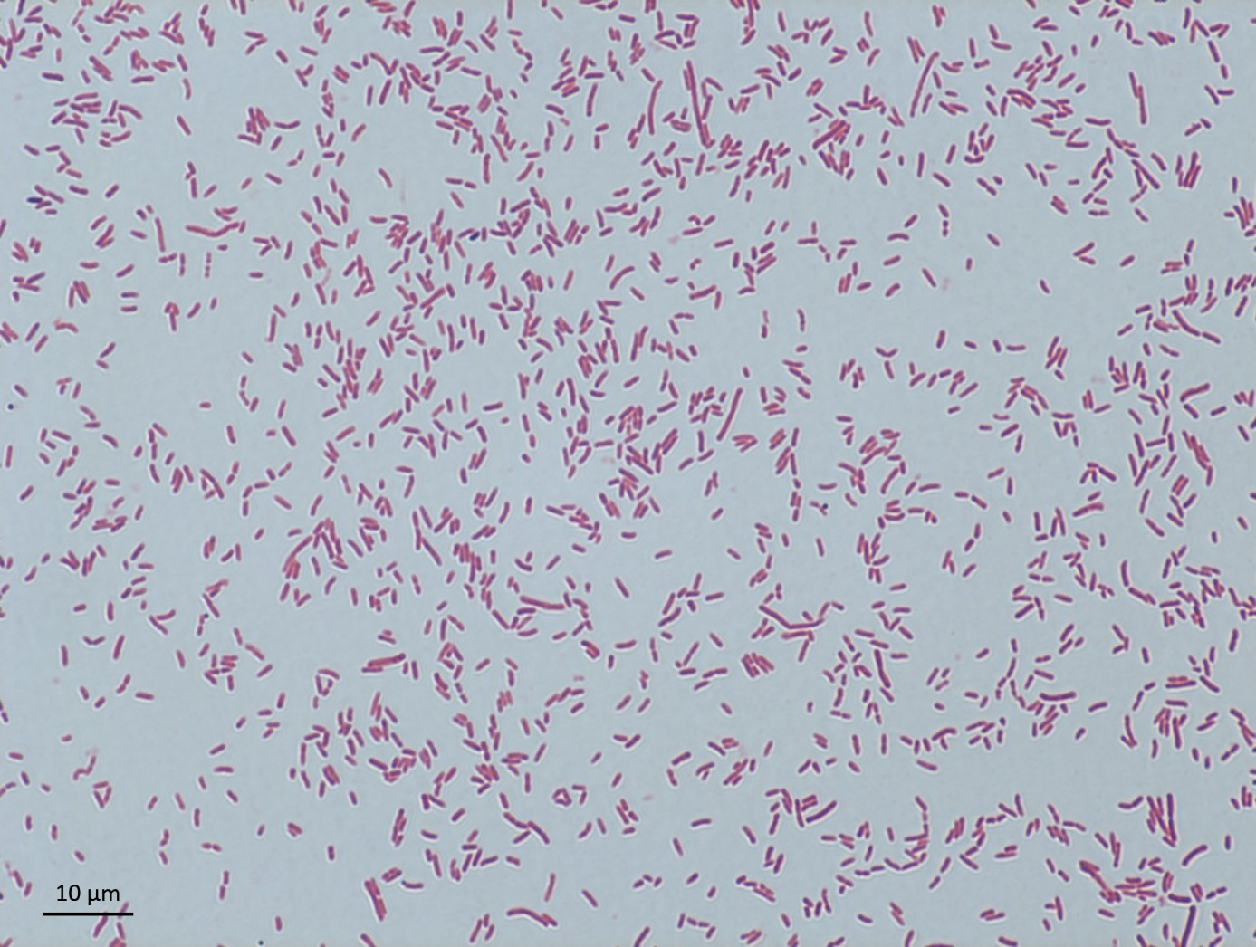 Photo en microscopie optique de la culture de Hafnia alvei (x63)